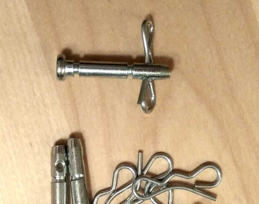 Scherbolzen für die Antriebsachse einer Schneefräse